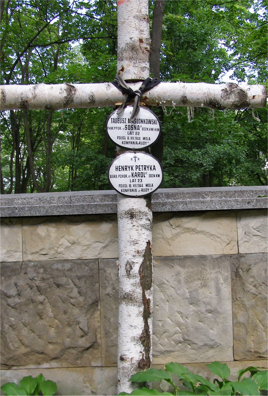 Grób Tadeusza Maślonkowskiego na Powązkach (fot Zu)